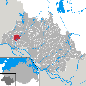 Bengerstorf in Mecklenburg-Vorpommern - district Ludwigslust